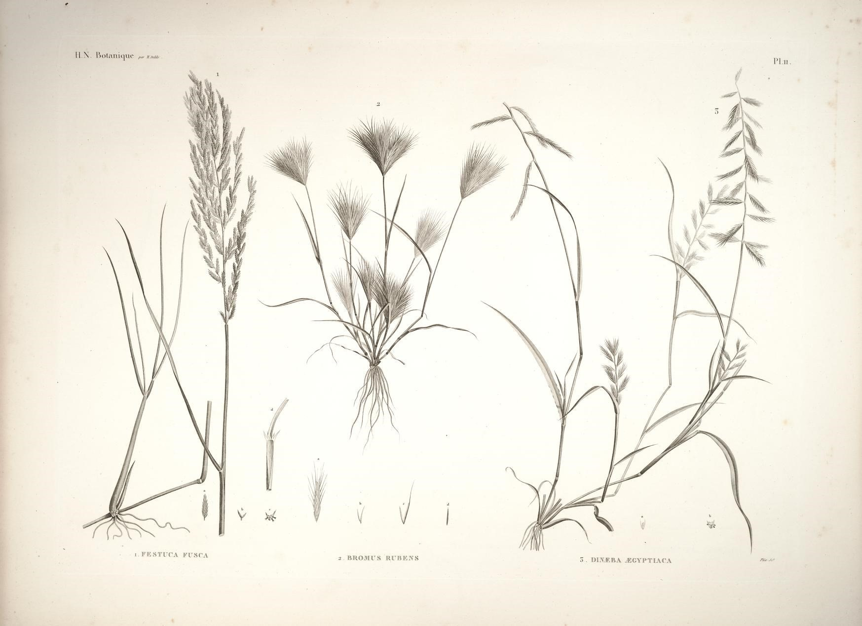 y ^-. L 'r f V.. \ J LIN. P)olanic.ue r par llJkiile . h — \ PJ.ll. \ N i.FESïUCA FrSCA ROMUS IIU S 5 , Bl.TJF.B/l CYl» ï IK C A /'/,-,■ ,r,-' ■- ■-. rf— ■ M- - - j \ \ • f